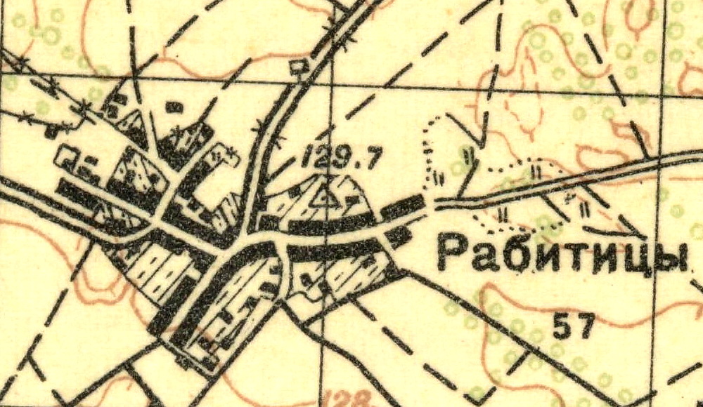 Топографическая карта Ленинградской области, квадрат О-35-23-Г (Волосово), деревня Рабитицы